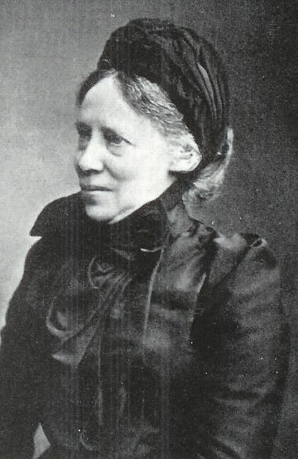 portretfoto van prinses Marie der Nederlanden (1841-1910). Foto omstreeks 1900; auteursrecht zeer hoogstwaarschijnlijk verlopen. Afbeelding komt in meerdere publicaties voor. Deze versie gevonden op alwaar het zonder auteursrechten gekopieerd mag worden.